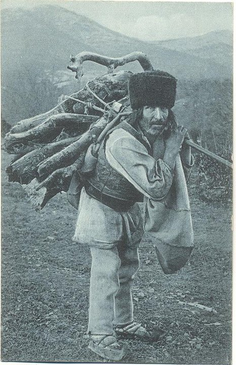 Cigán zo Slovenska, pravdepodobne začiatok 20. storočia